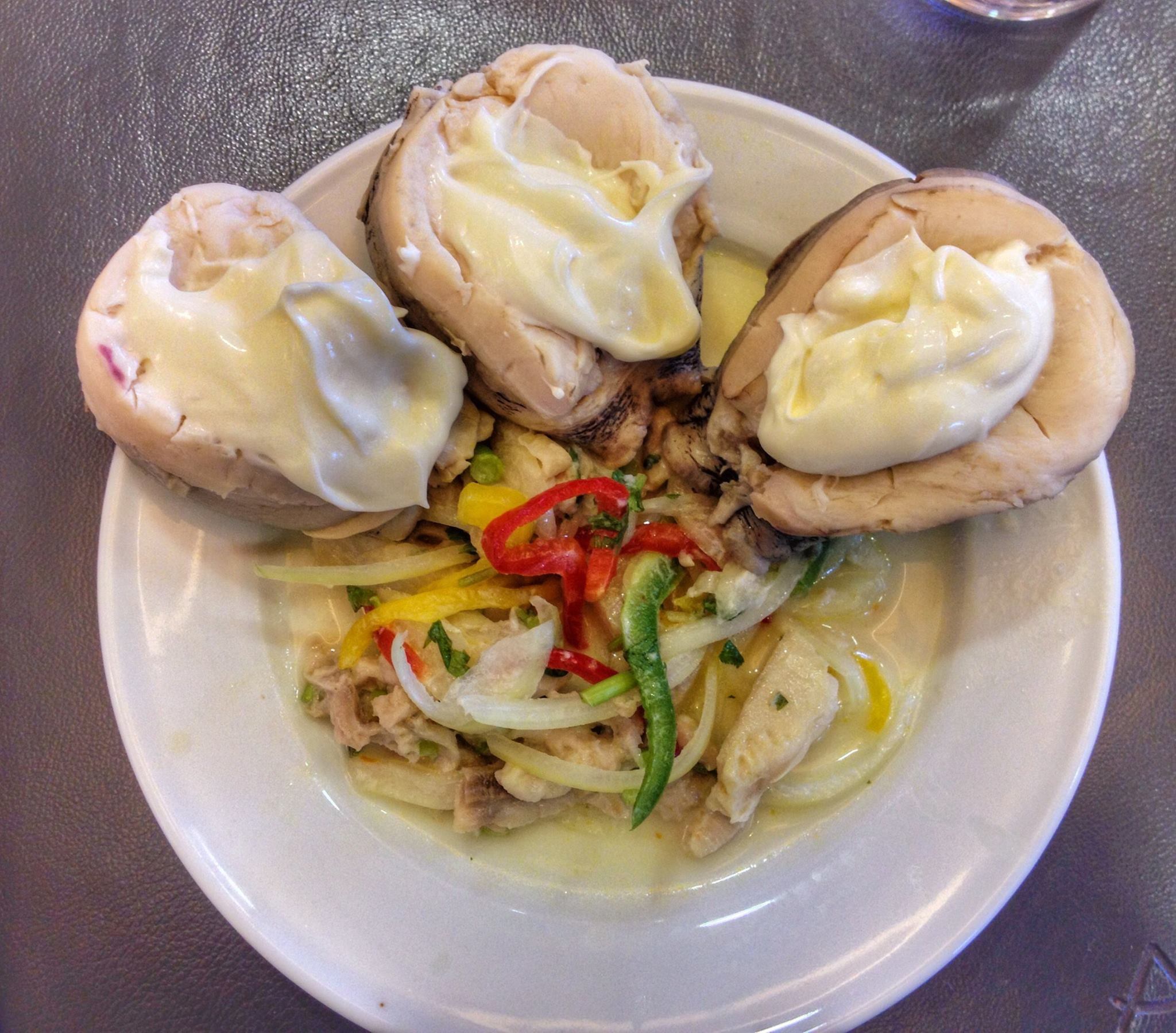 Locos de Puerto Montt. Chile